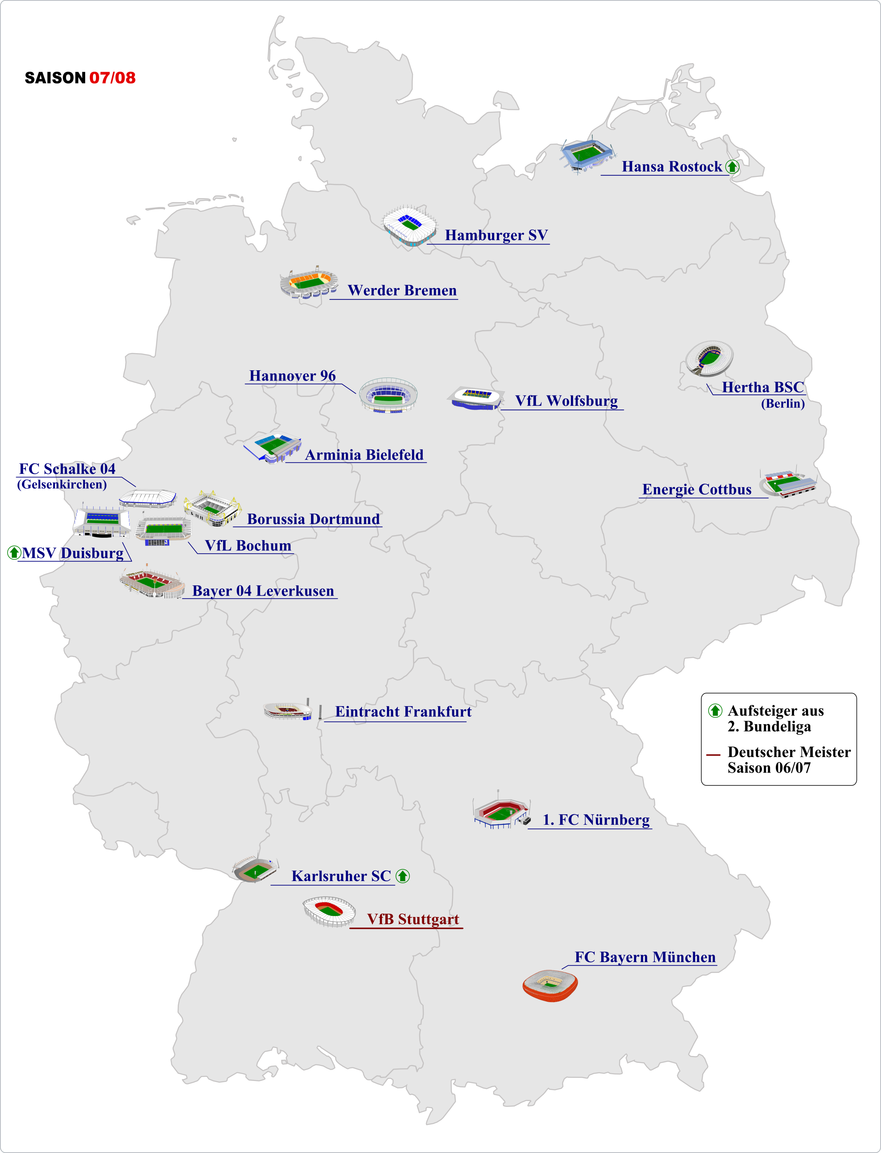 Verteilung der fussball-Bundesligavereine in Deutschland